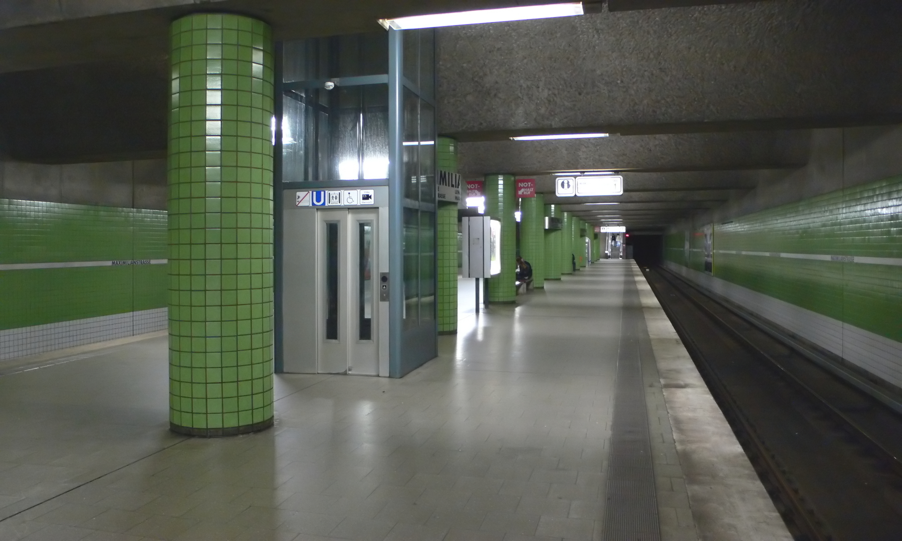 U-Bahnhof Maximilianstraße der U-Bahn Nürnberg, Bahnsteigebene, Blick von Osten